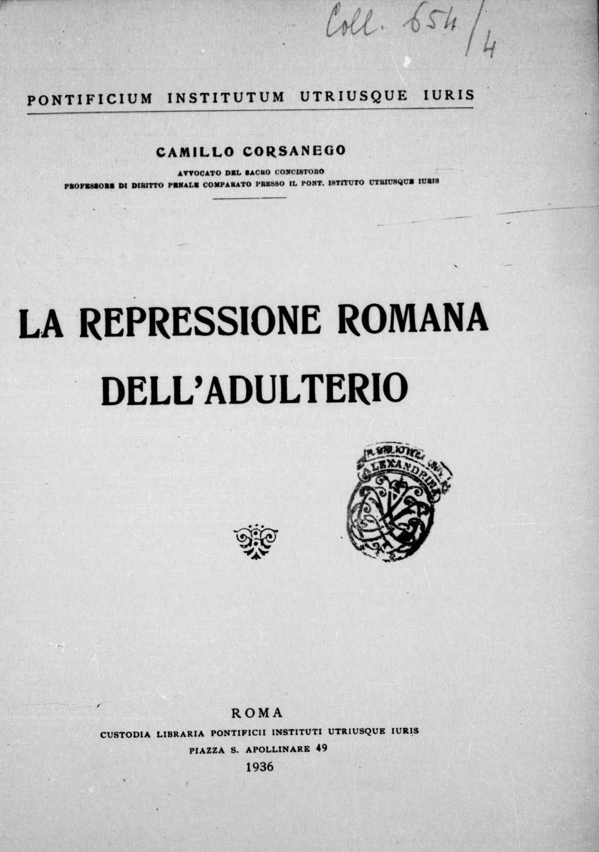 Frontespizio